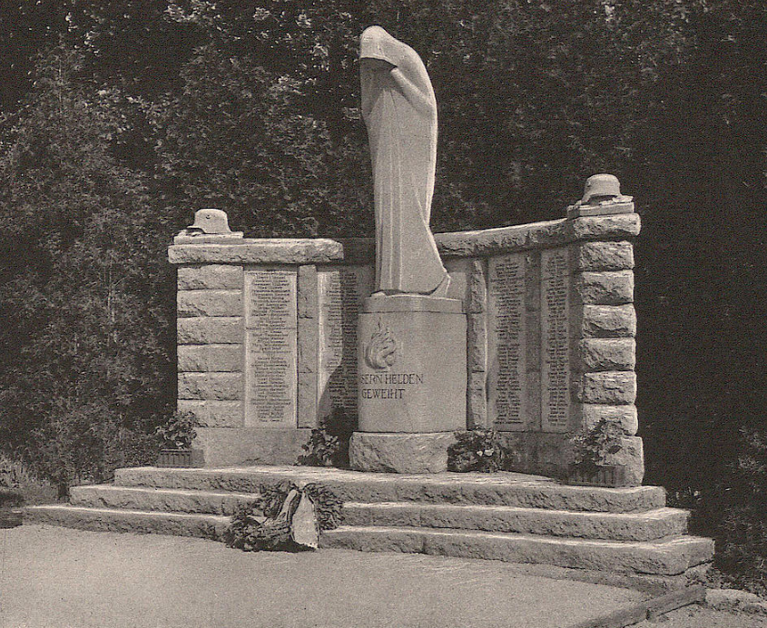 Professor Cirillo Dell’Antonio: Kriegerdenkmal in Bad Warmbrunn)